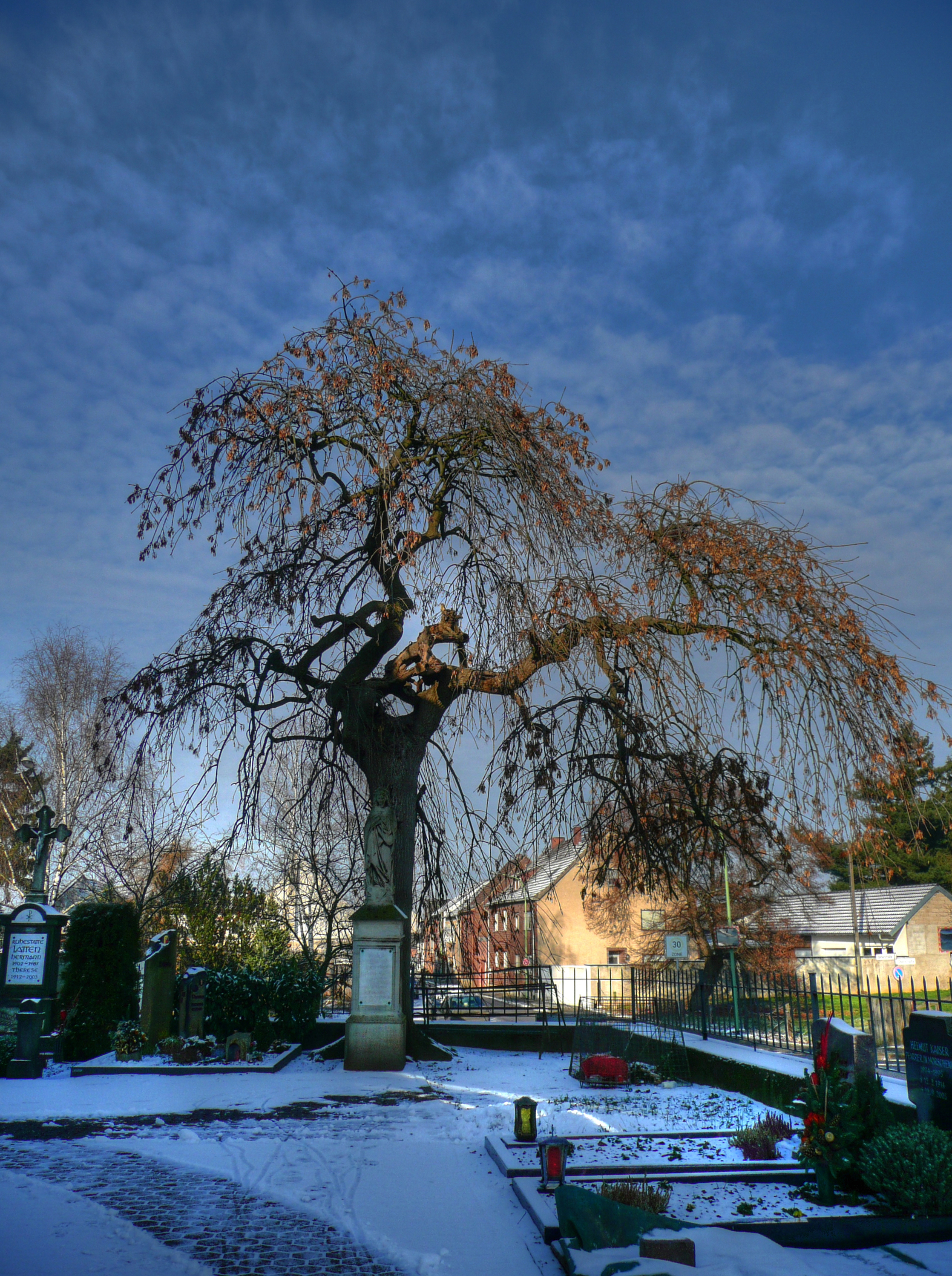 Auf dem Morschenicher Kirchhof